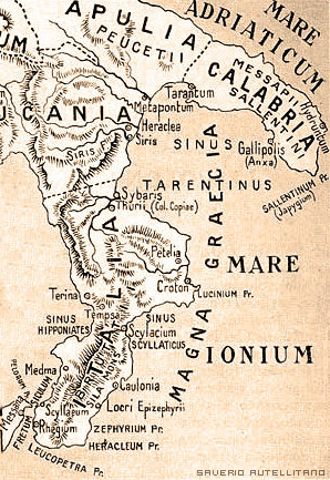 Colonie Greche d'Italia e Sicilia